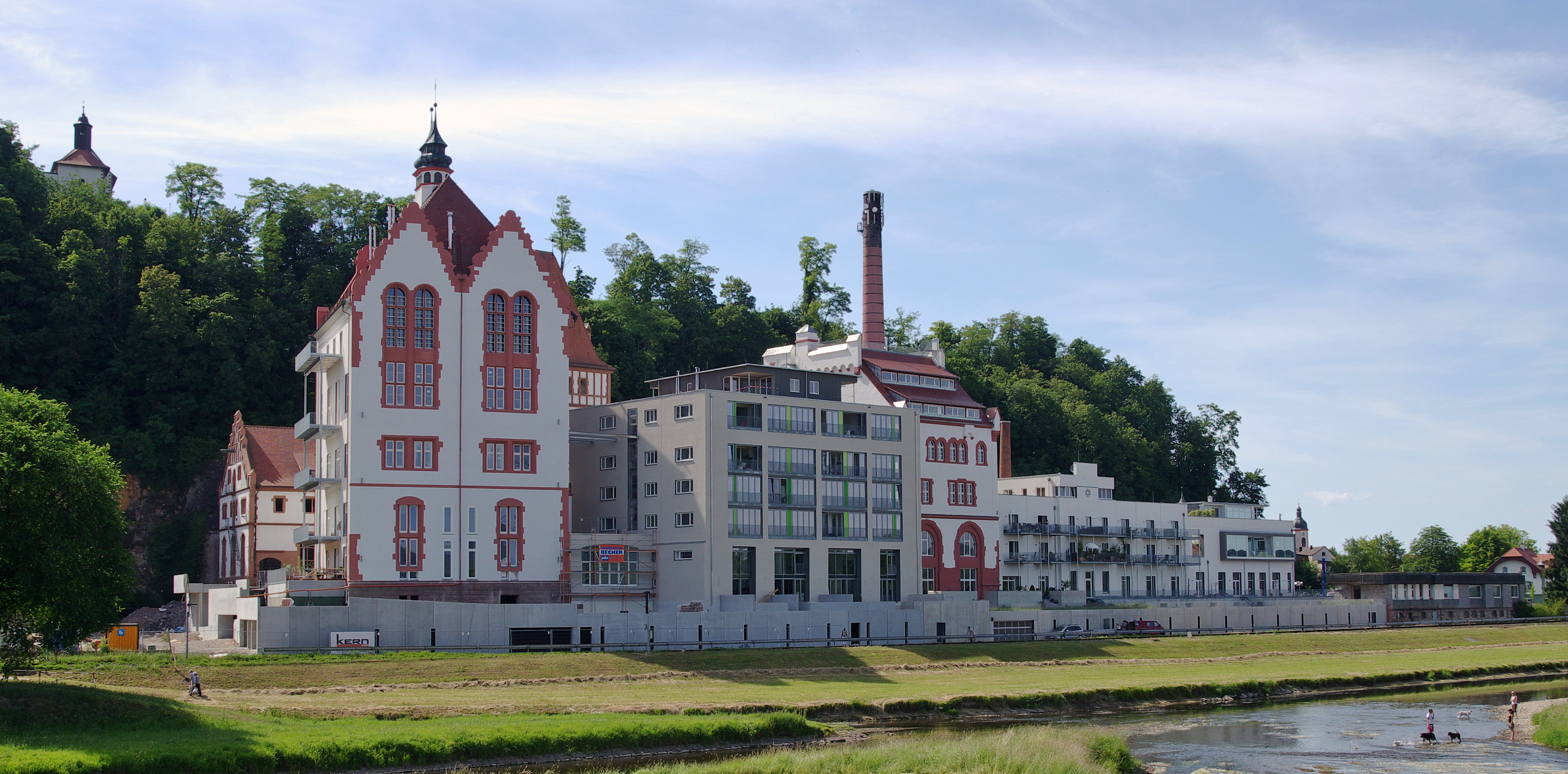 Die Riegeler Brauerei; heute umgebaut zu Lofts